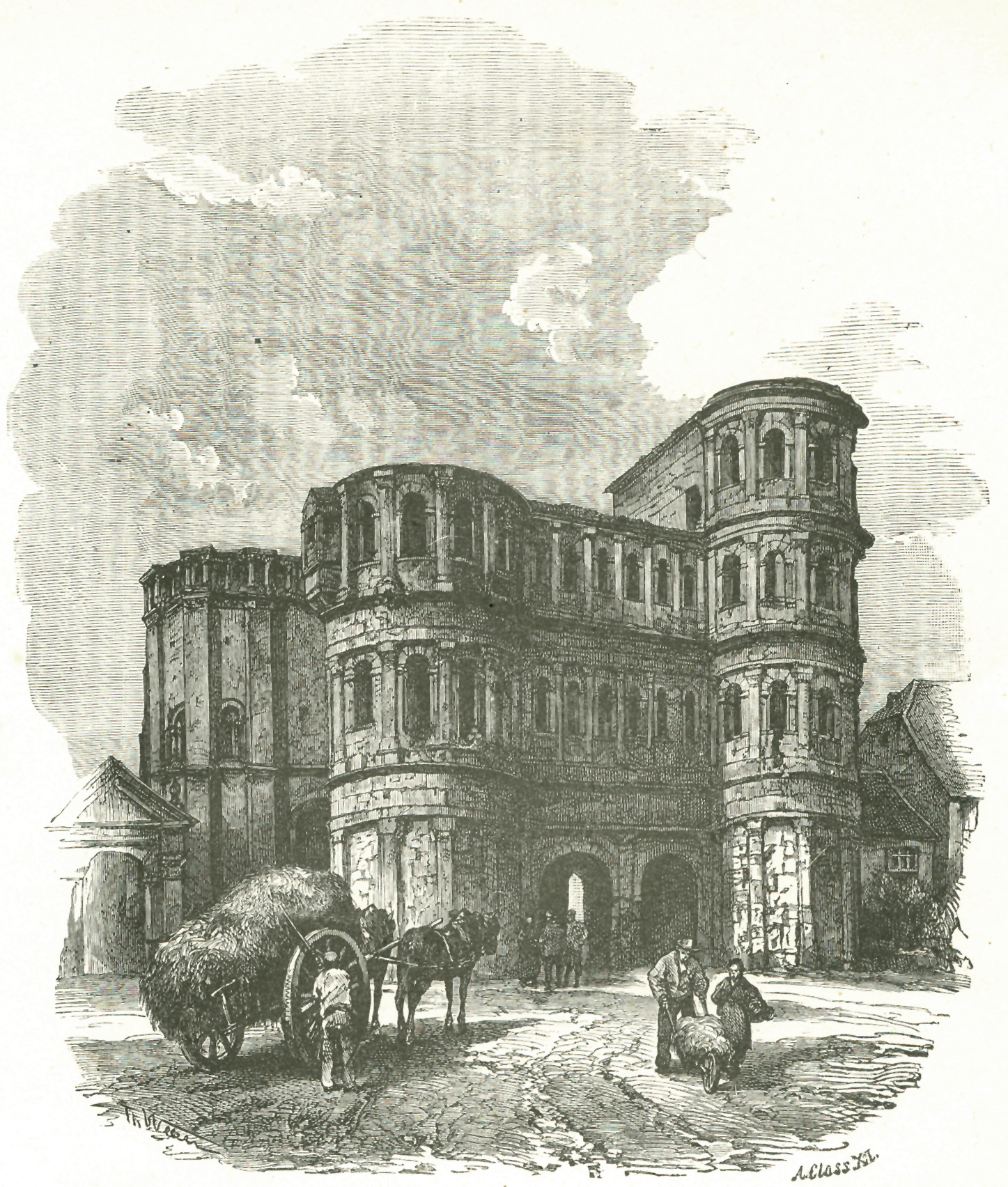 Porta nigra in Trier. Gezeichnet von Theodor Weber. Xylographie von A. Cloß. Illustration in: Die Rheinfahrt. Von den Quellen des Rheins bis zum Meere. Stuttgart, Verlag von A. Kröner 1876. Hier nach: Bilder-Album zur neueren Geschichte des Holzschnitts in Deutschland. Hrsg. vom Albertverein. Mit Text von Herm. Lücke. Leipzig: E. A. Seemann 1877, S. 61.